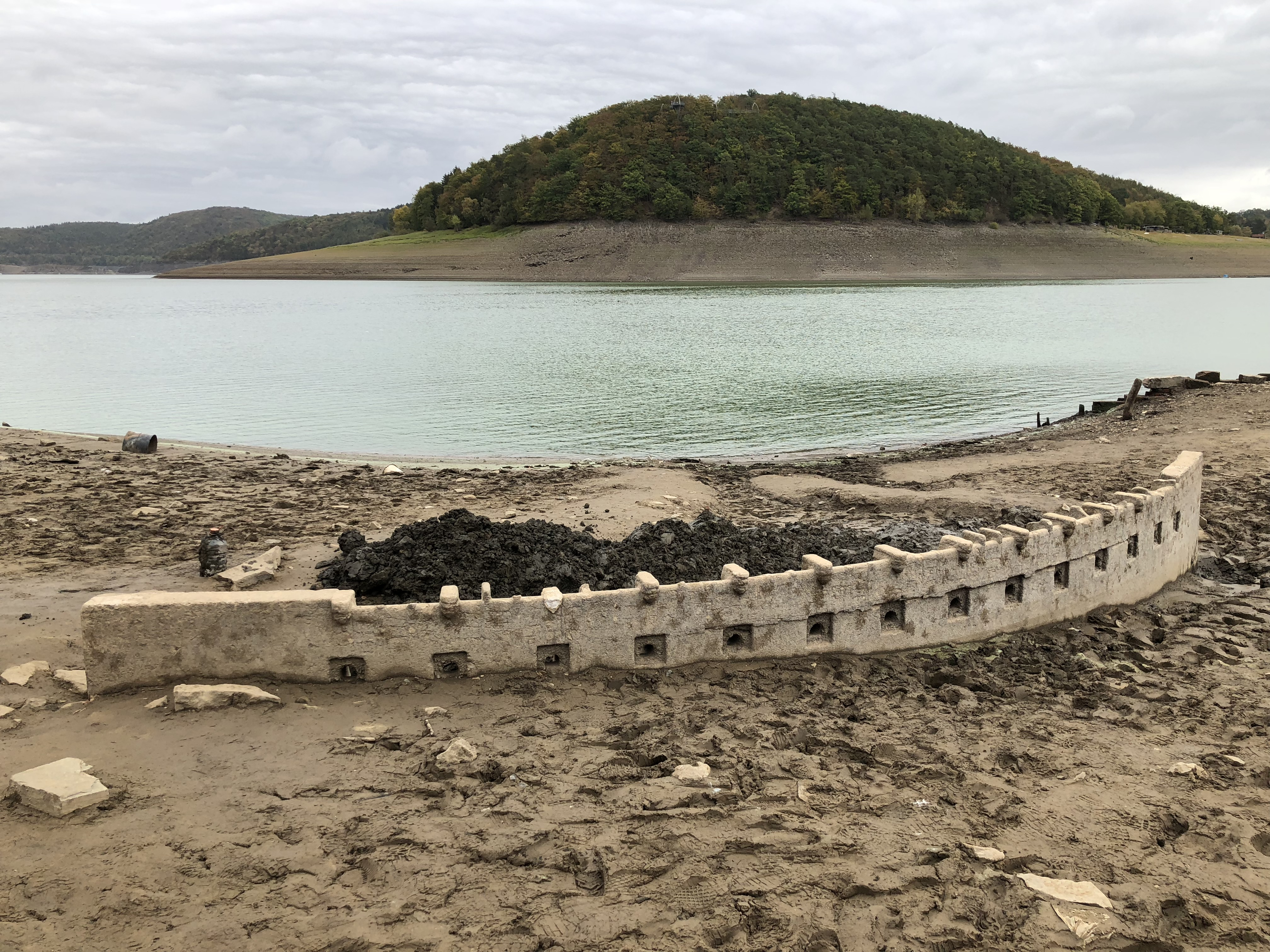 Das Sperrmauermodell im Edersee nahe der ehem. Bericher Hütte bei extremem Niedrigwasser (2018)